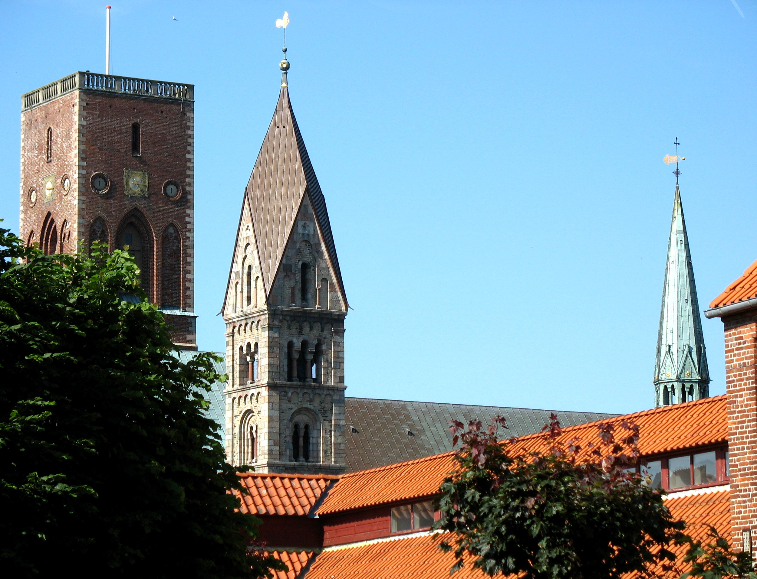 Ribe domkirke.